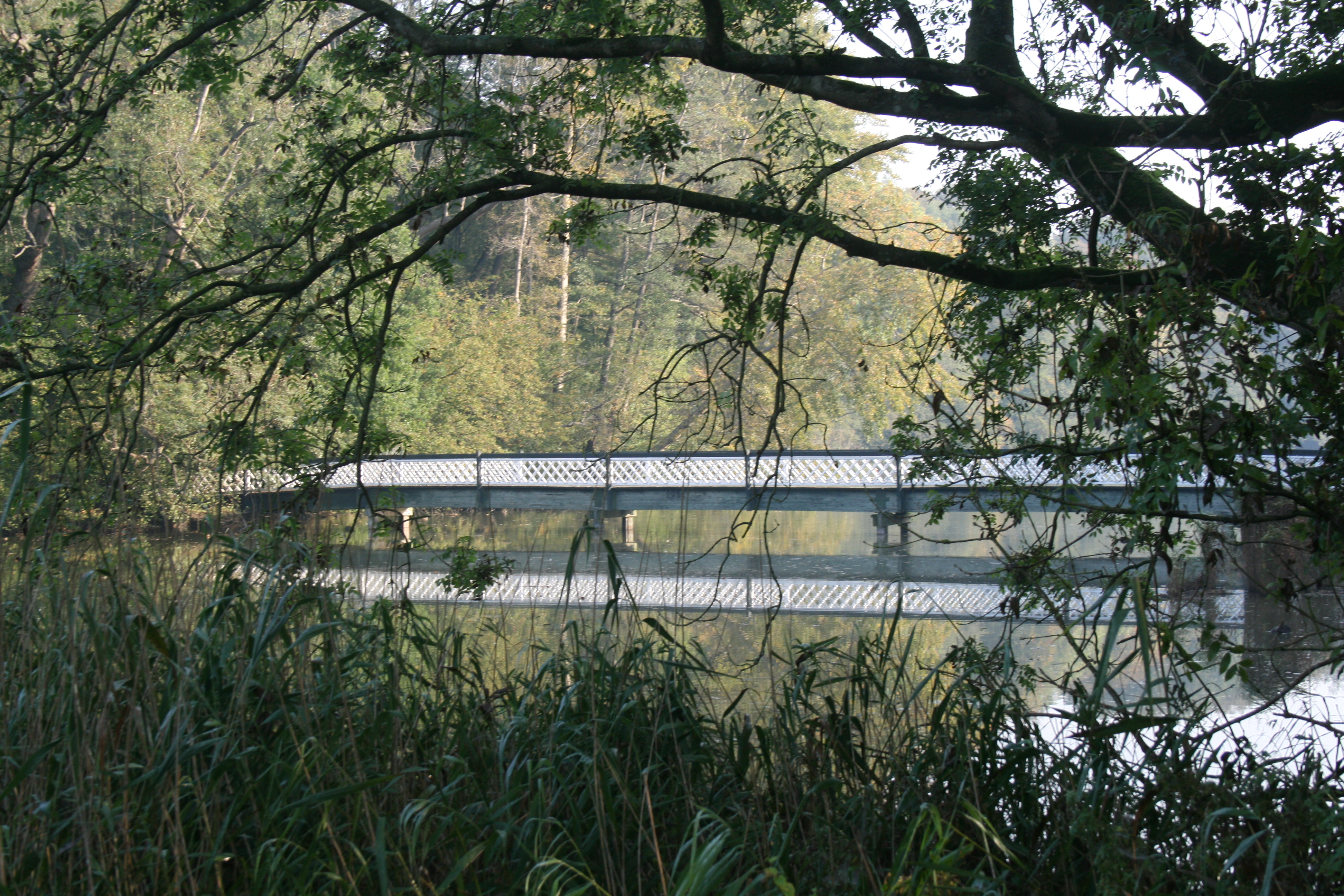 Brücke im Landschaftspark von Gut Emkendorf